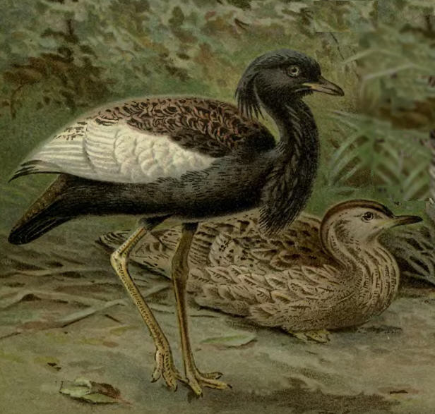 Bengal Florican (Houbaropsis bengalensis syn. Eupodotis bengalensis)